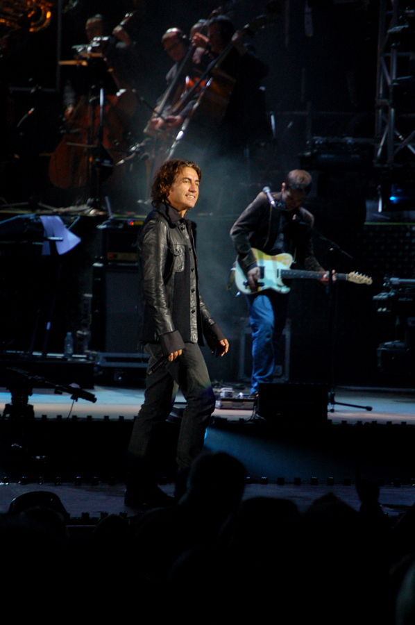 Fotografia di Luciano Ligabue al concerto presso l'Arena di Verona del 25 settembre 2008